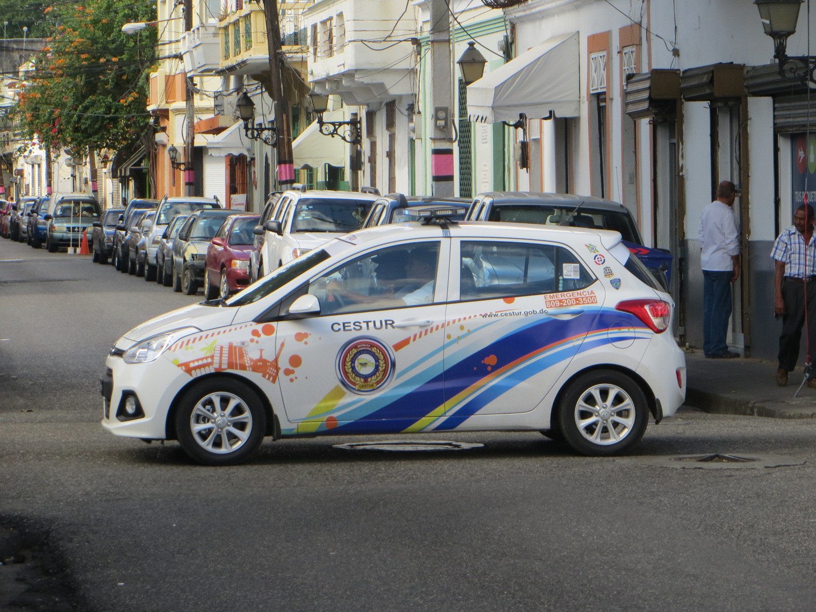 Santo Domingo (Rep. Dominicana) (237)